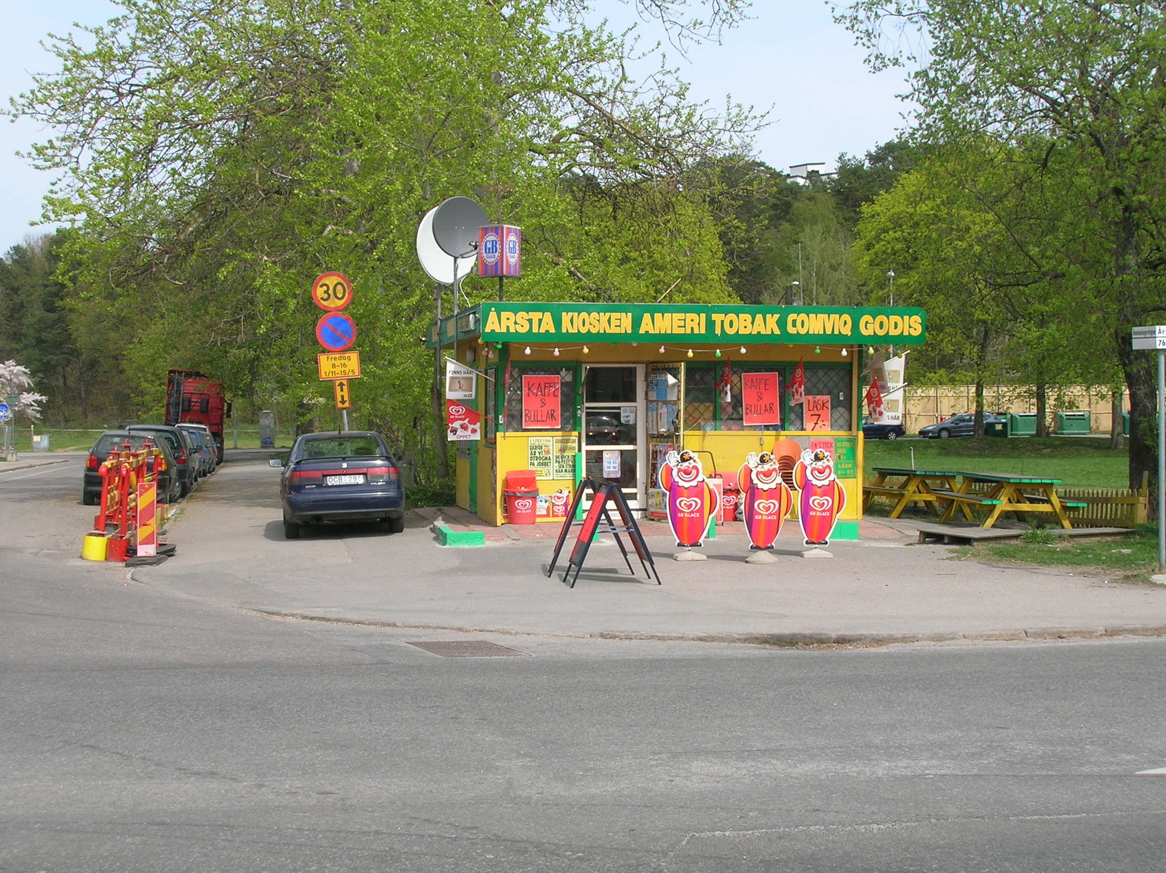 Kiosken i korsningen Årstavägen - Åmänningevägen, Årsta, Stockholm